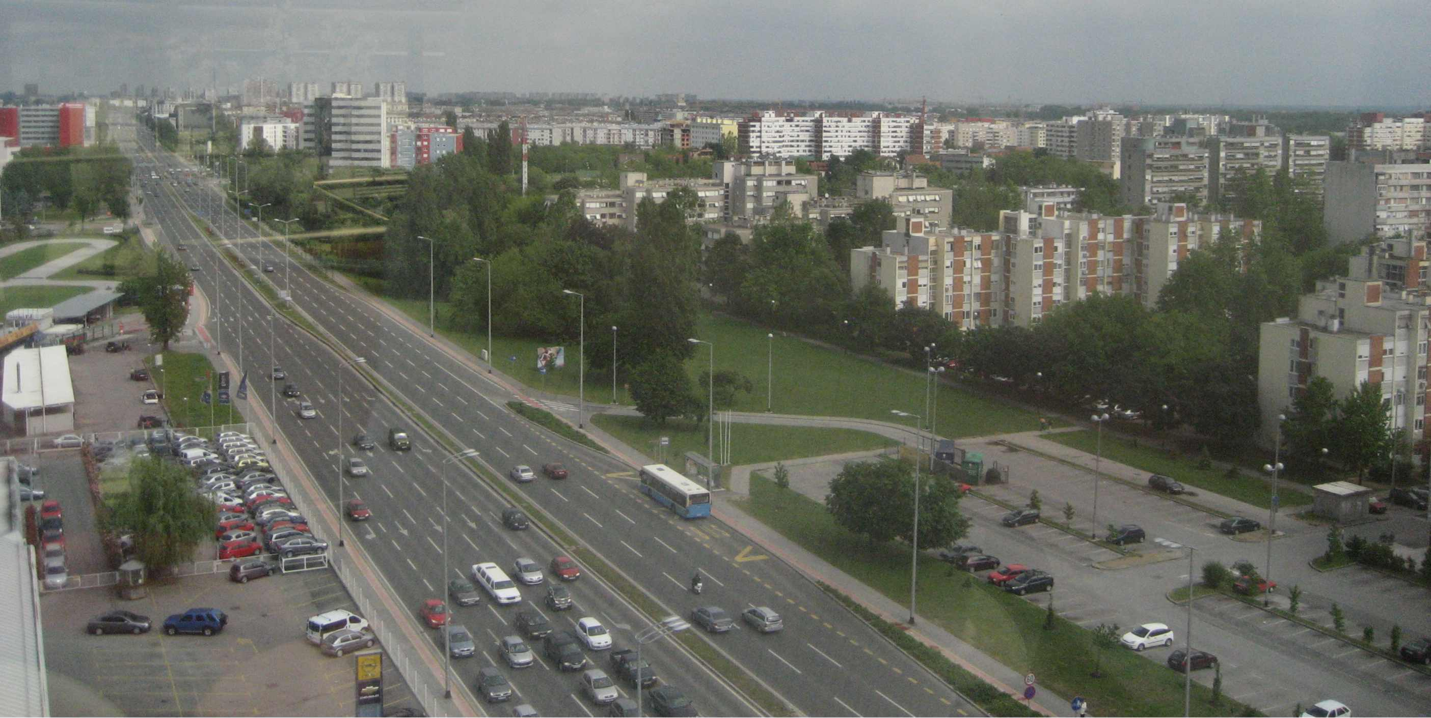 Zagrebacka Avenija, Zagreb, Croatia